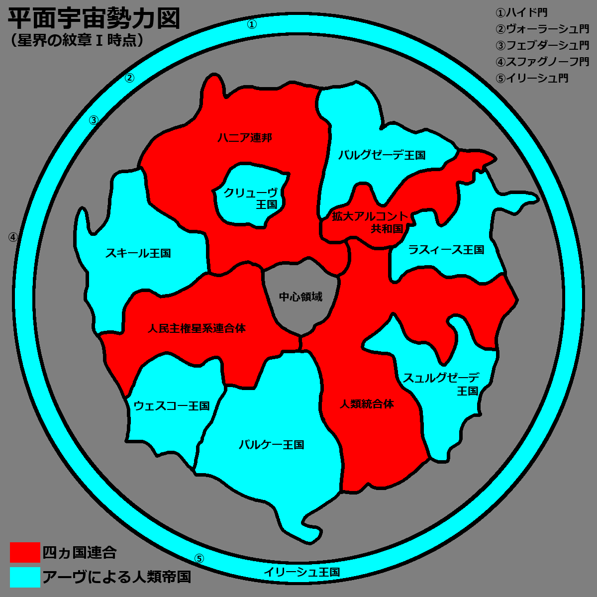 星界シリーズにおける平面宇宙勢力図。星界の紋章開始時点のもの。